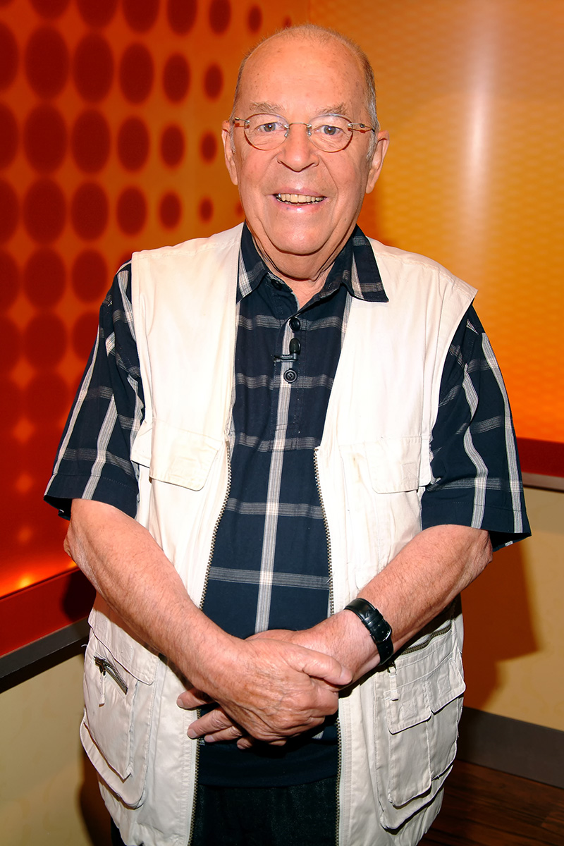 Chris Howland am 17.07.2009 zu Gast im ZDF-Studio Düsseldorf